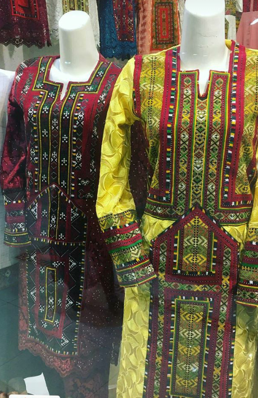 زی استین یا بدن استین سوزن دوزی متصل به پارچه ، نمونه پوشش زنان و دختران